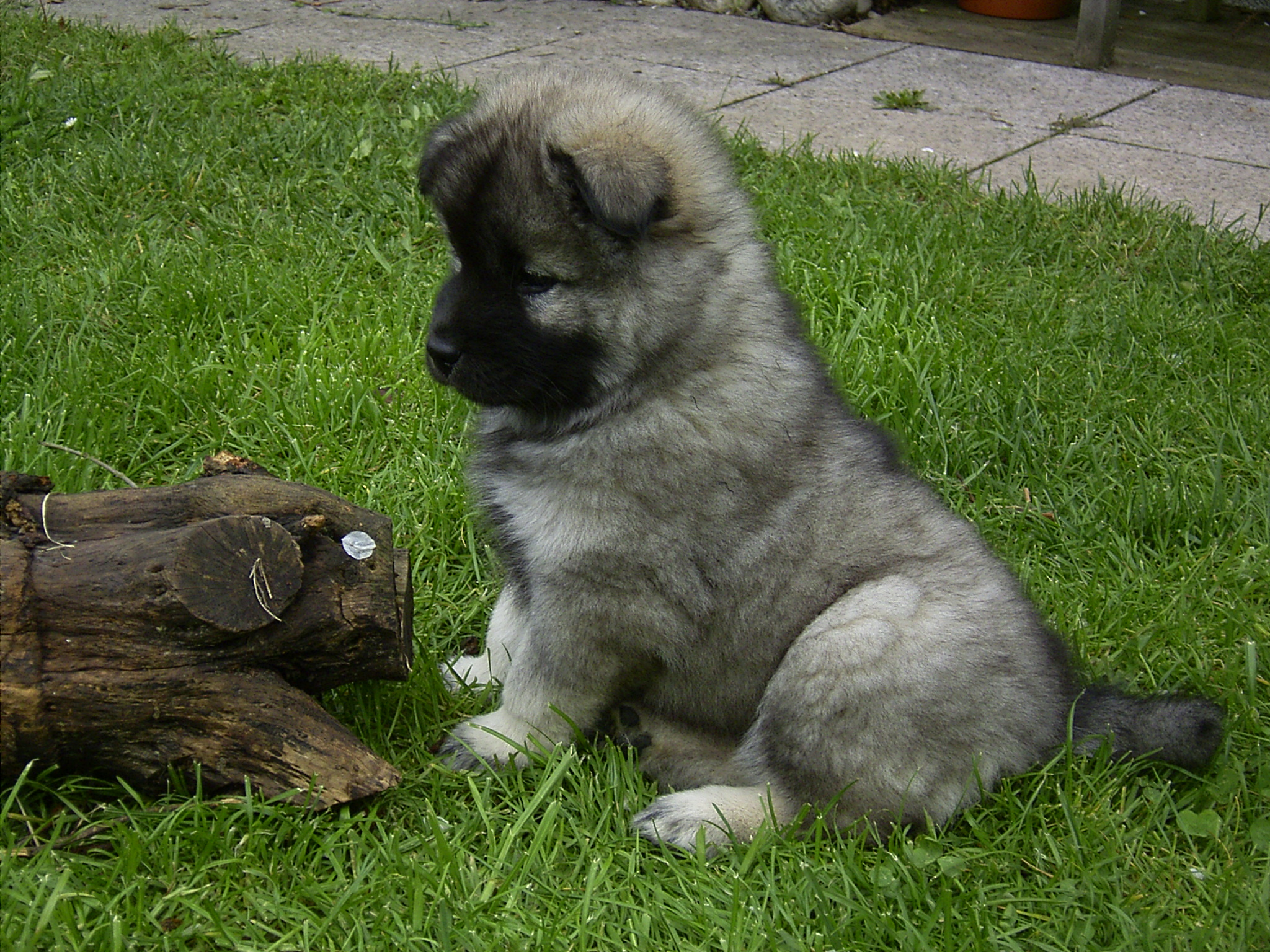 Eurasierwelpe